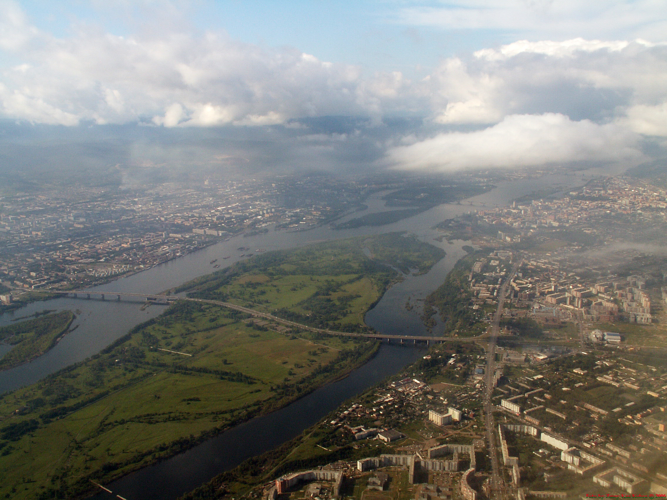 Красноярск аэрофото